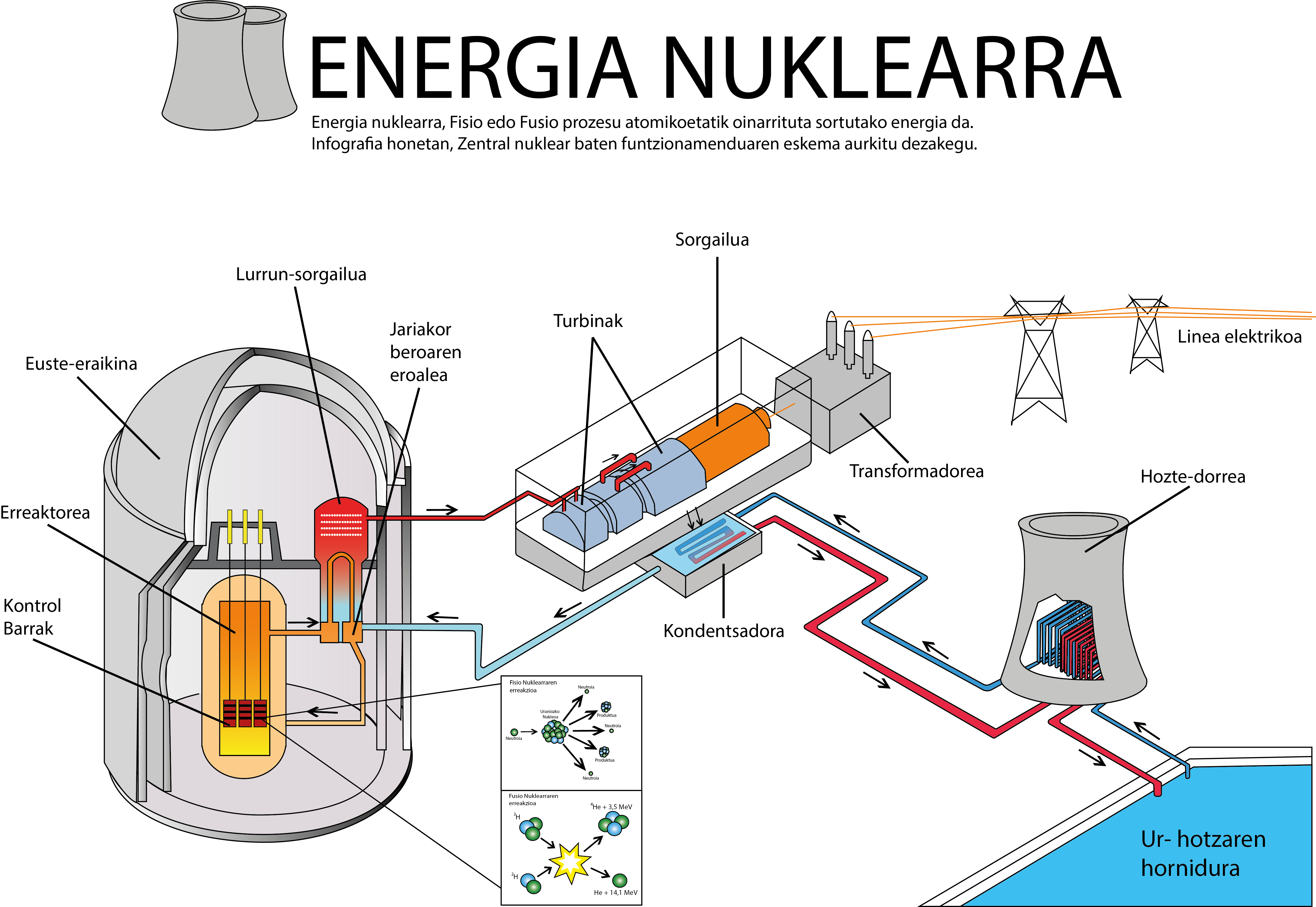 Infografia honetan, Zentral nuklear baten funtzionamenduaren eskema aurkitu dezakegu